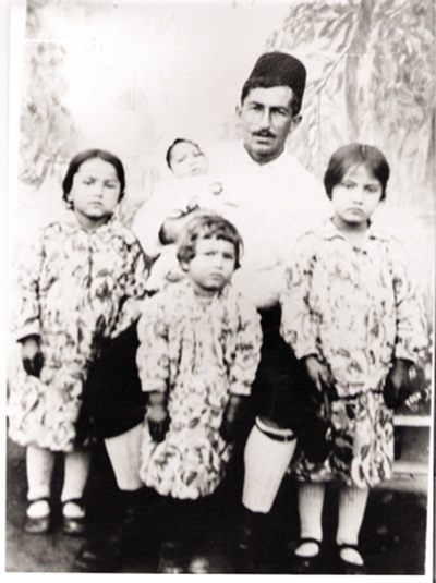 Minareliköylü Mustafa Halil ve çocukları Fotoğrafta başında fes ve dizliğiyle görülen, Minareliköylü rahmetli Mustafa Halil, üç kızı olduktan sonra, özlemle beklenen erkek çocuğu dünyaya gelince; Minareliköy’e fotoğrafçı getirtip, keyifle bu fotoğrafı çektirtir. 1929 yılında çekilen fotoğrafta soldan sağa şu kişiler yer alıyor. Birinci sıradaki kız çocuğu, Cihangir’de yaşayan Refika Çanakçı, ikinci sıradaki Geçitkale’de yaşayan Huriye Tahsin ve üçüncü sıradaki ise merhume Fatma Ercantan’dır. Baba Mustafa Halil’in kucağındaki oğlu ise, rahmetli Halil Mustafa’dır.